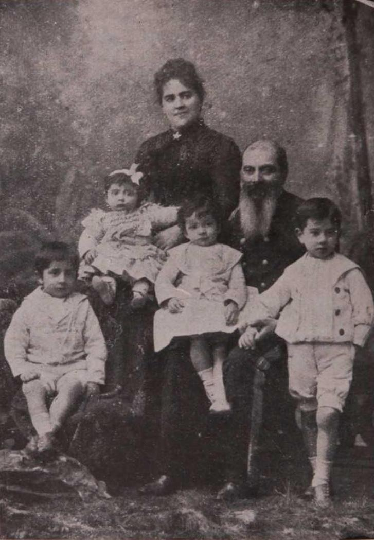 El General Orozimbo Barbosa y su familia en 1891.